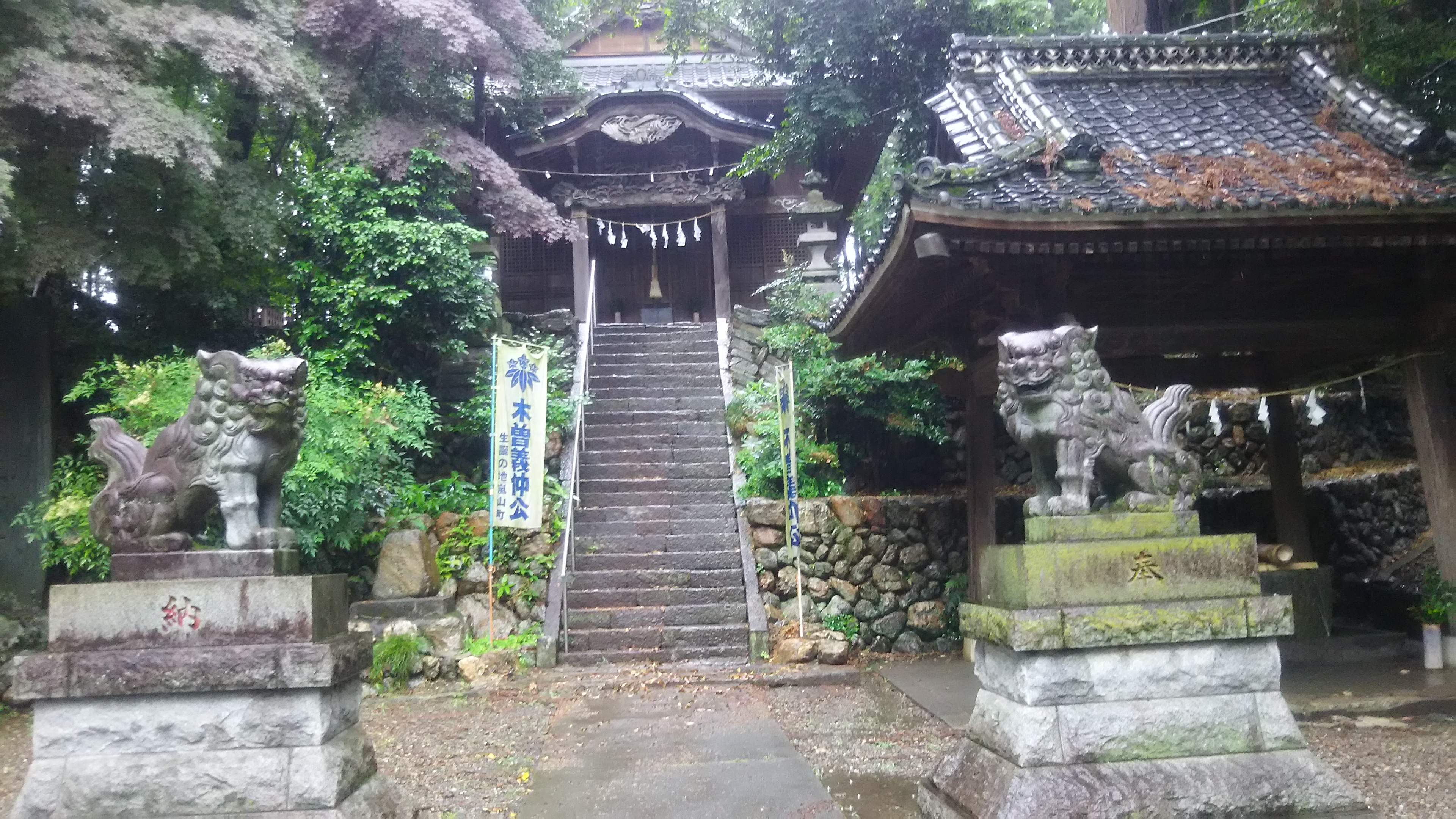 比企郡嵐山町鎌形1993最寄東武東上線武蔵嵐山駅